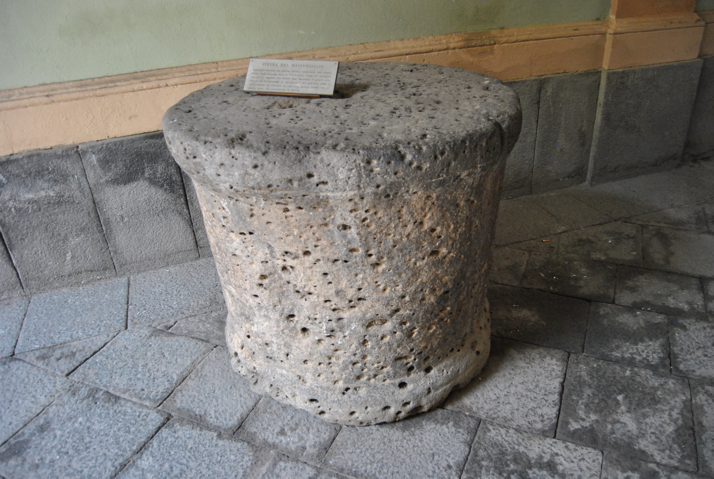 La Pietra del Malconsiglio, nella sua attuale (2015) collocazione all'interno del Palazzo degli Elefanti di Catania.